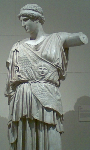 Phidias. Athena Lemnia in in the Staatliche Museum, Albertinum, Dresden. Plaster cast in Pushkin Museum, Moscow